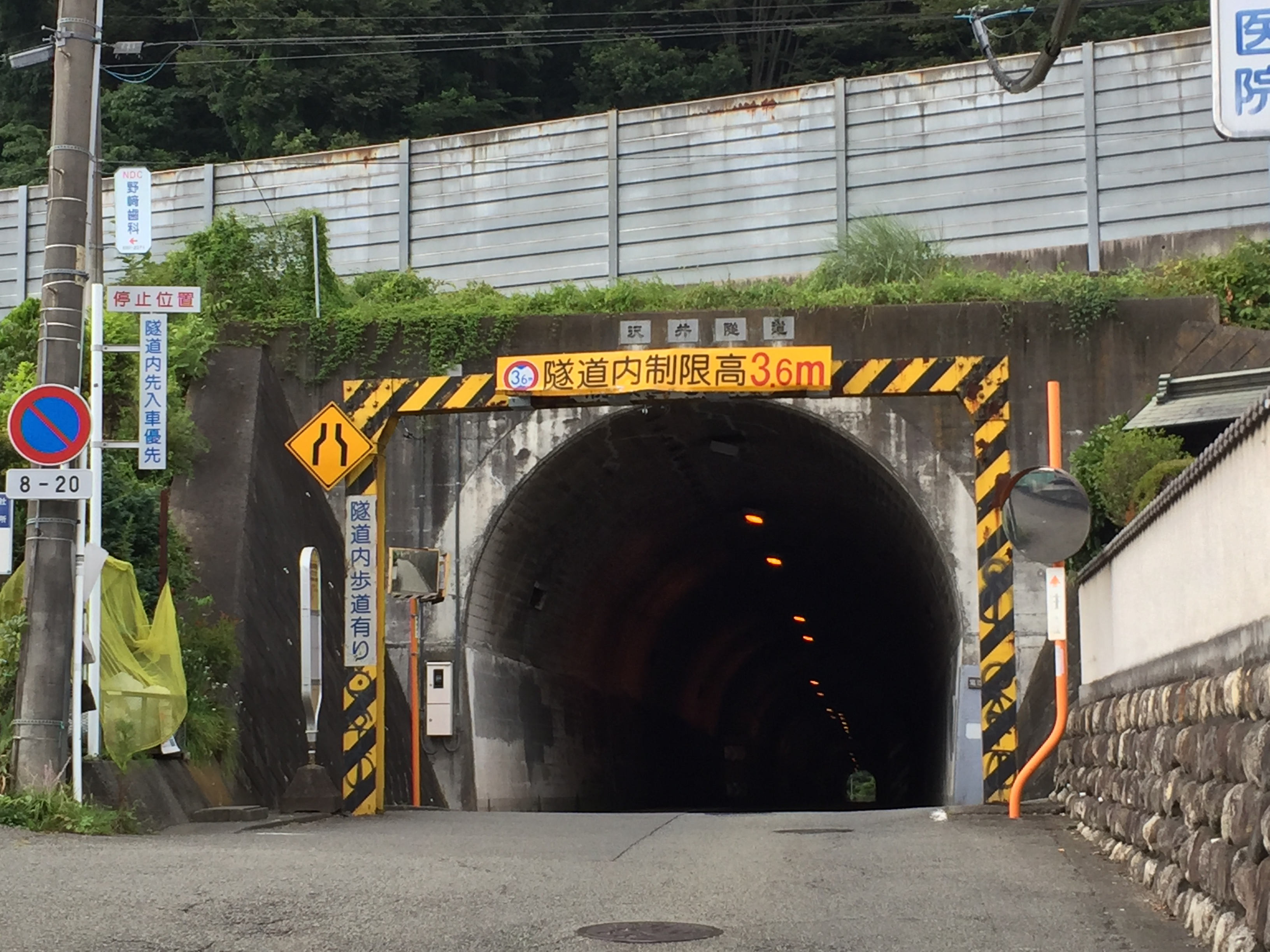 神奈川県道522号・沢井隧道（相模原市緑区小渕）。中央自動車道高架をくぐる。高さ制限が3.6mなおかつ隧道内で幅員が縮小する。路線バスも通行する。